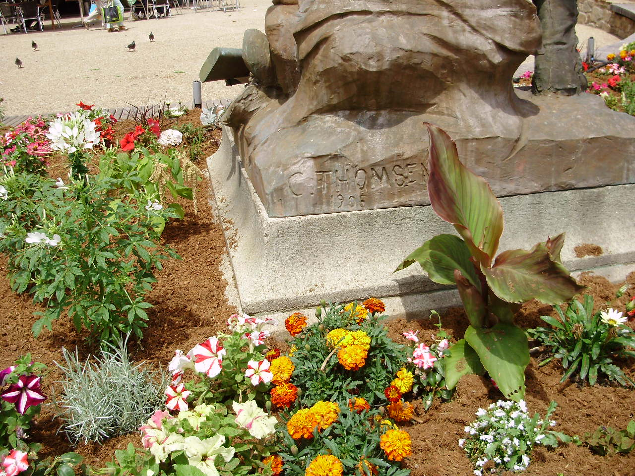 Il s'agit du monument à la mémoire de Ch Lovy érigé à Tulle (Corrèze) créé par Constant Auguste Thomsen, sculpteur, avec un angle sur la signature